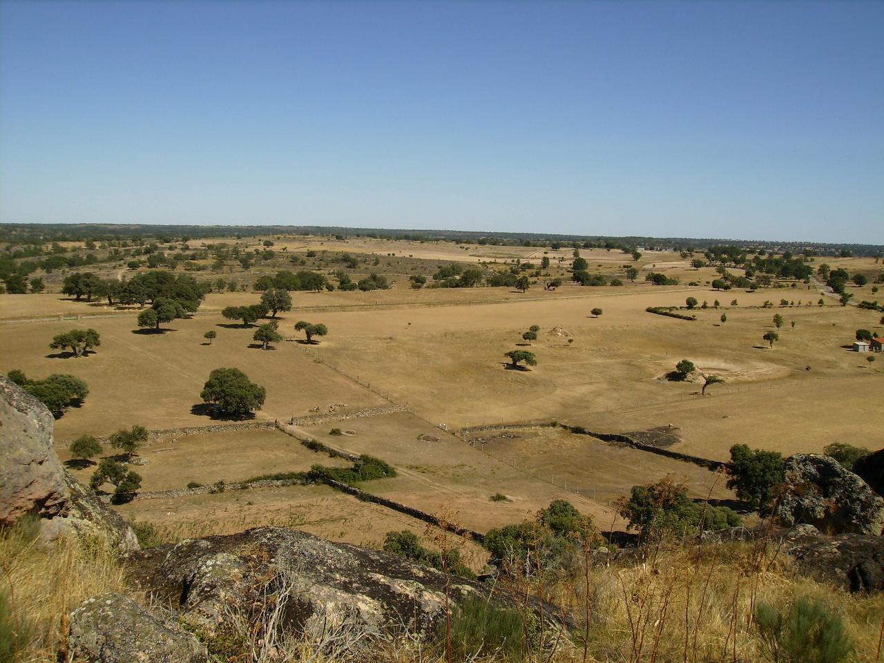 Vistas desde la Peña Gorda